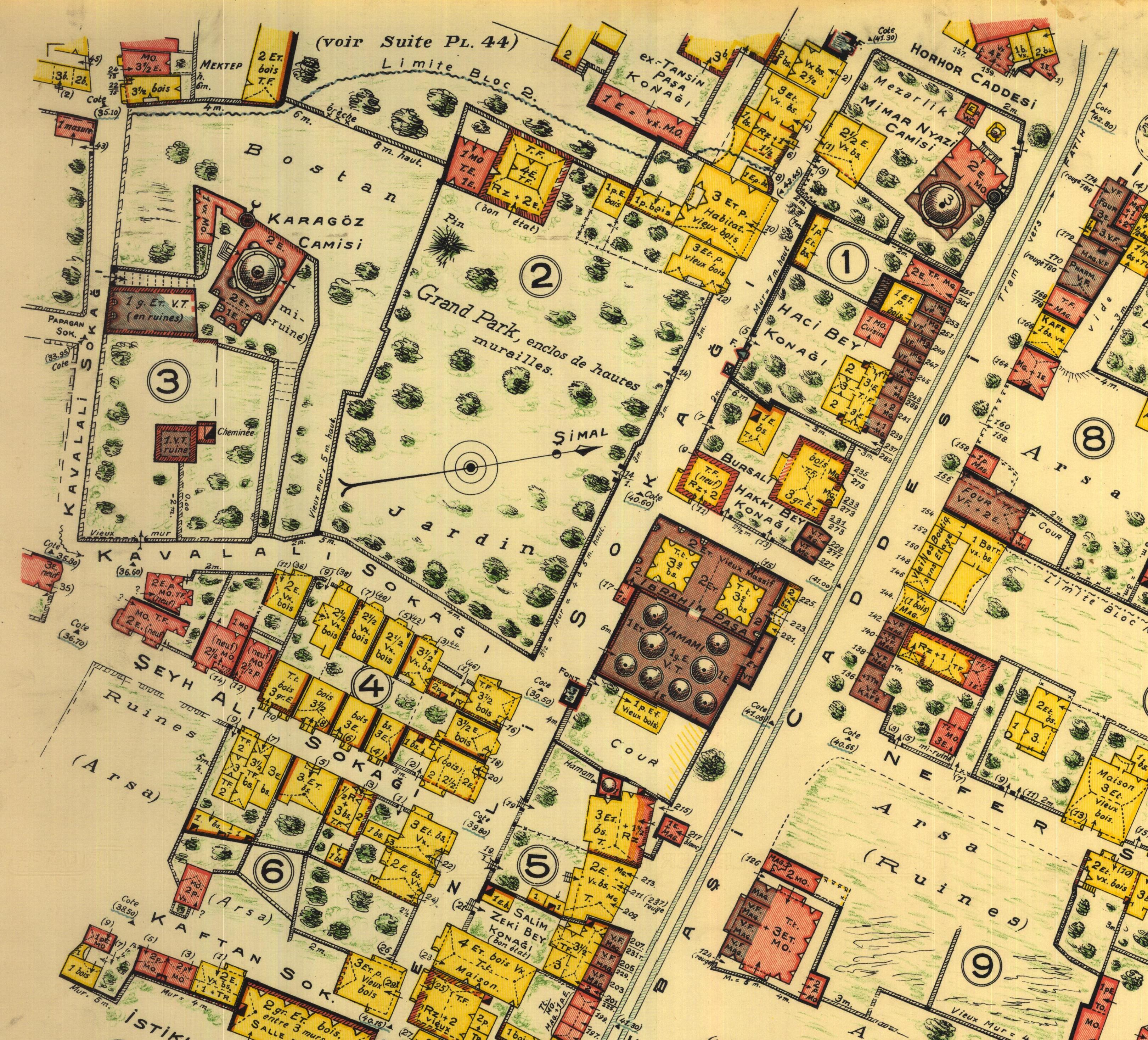 Pervititch Sigorta Haritaları üzerinde İbrahim Paşa Hamamı.